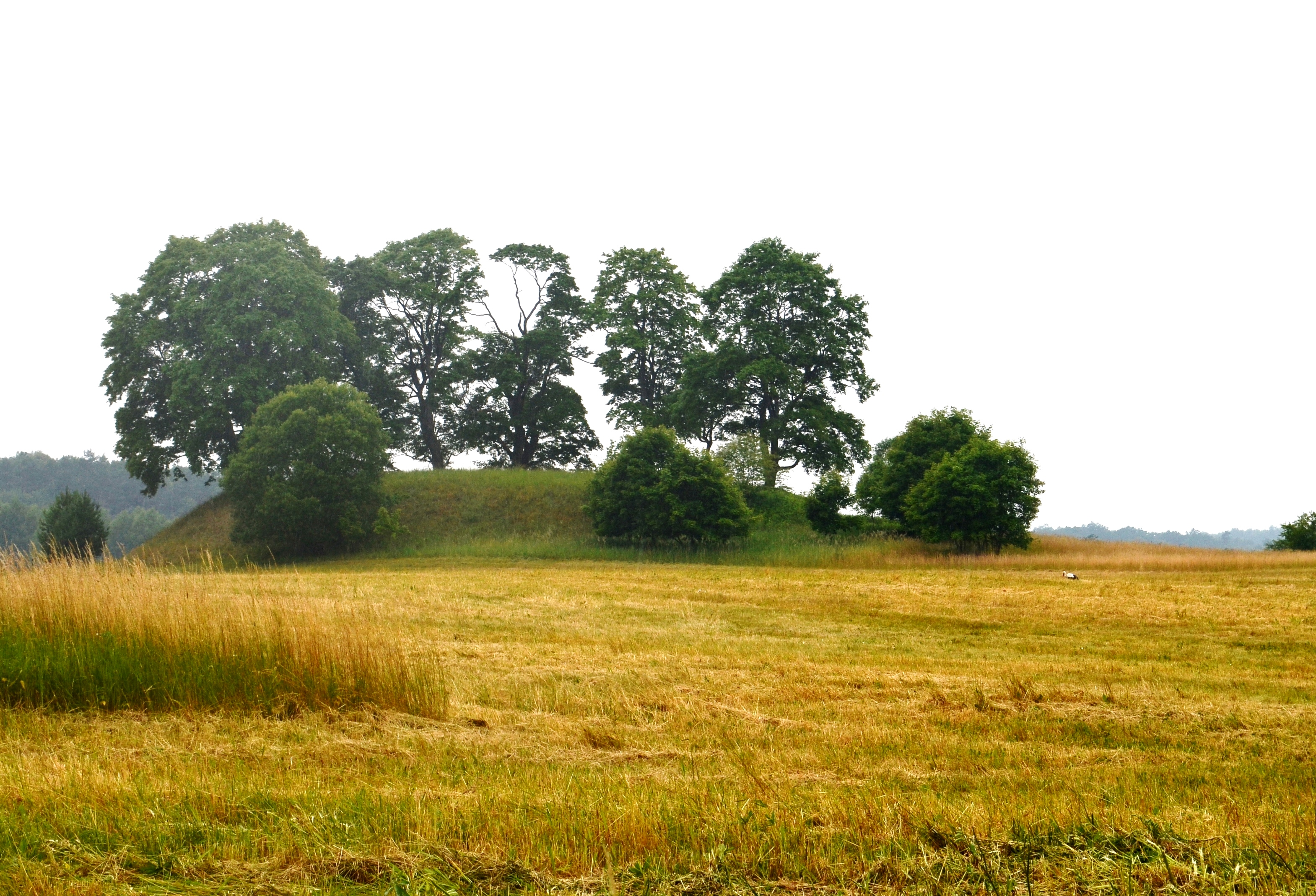 Šereitlaukio II piliakalnis (Milžinkapis), Šereitlaukis, Pagėgių sav.